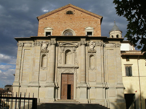 Città di Castello-La Cathédrale-Ombrie-Italie